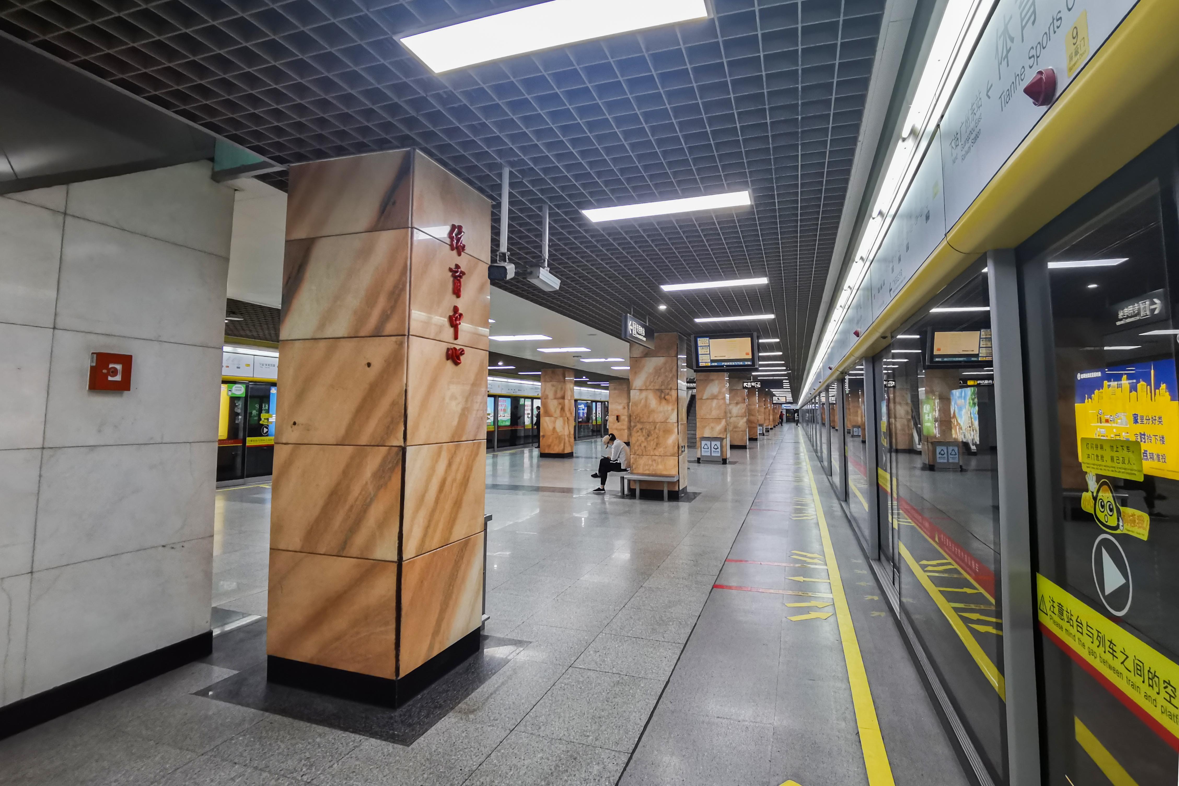 广州地铁体育中心站